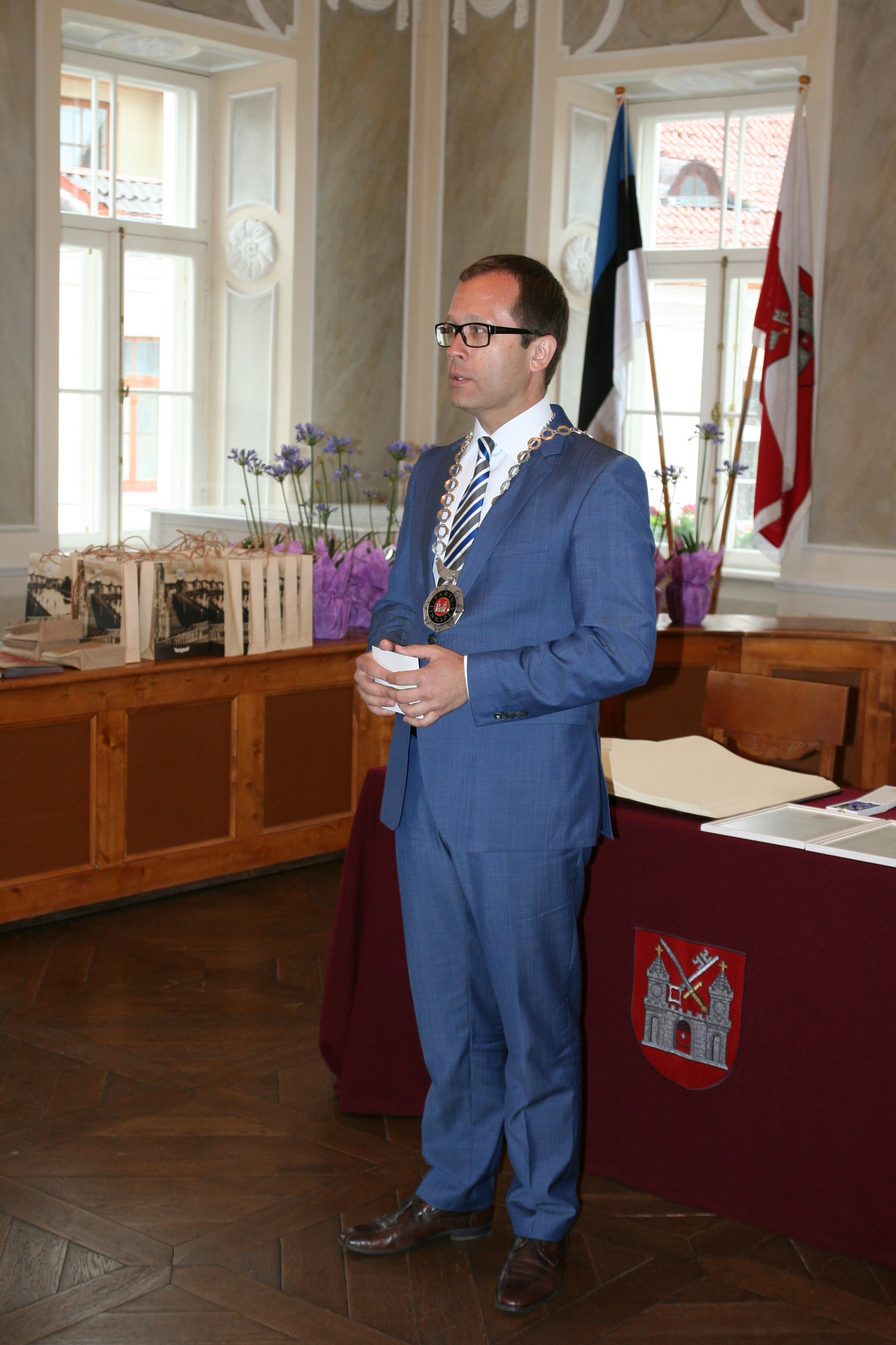 Urmas Klaas, Tartu linnapea, Tartu medalite üleandmisel 29. juunil 2014